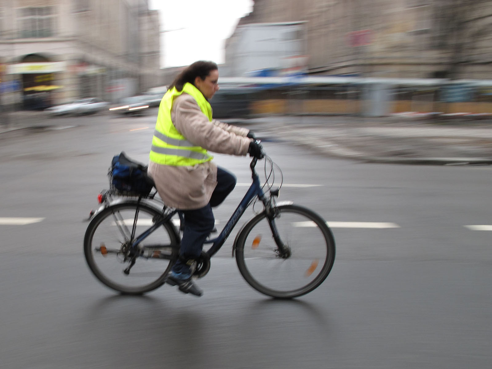 Fotografía hecha usando la técnica del barrido en la ciudad de Berlín